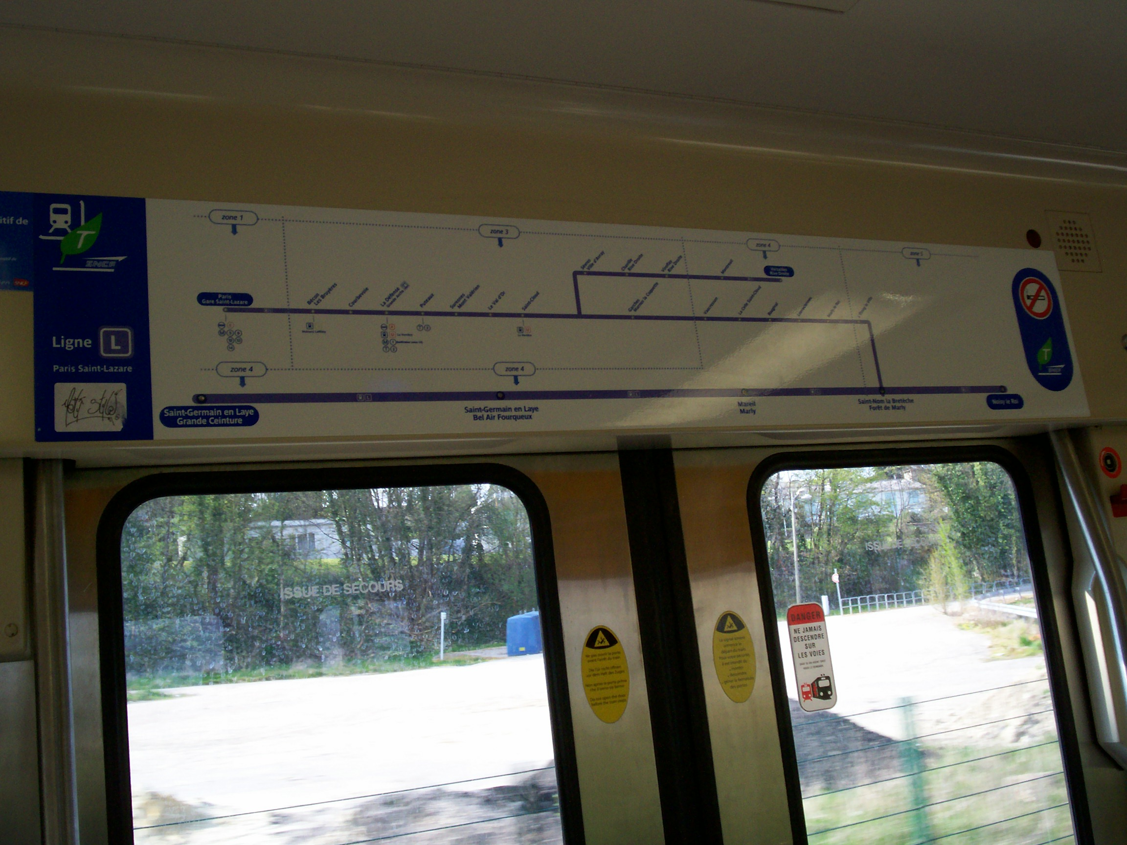 Intérieur d'un rame Z6400gco